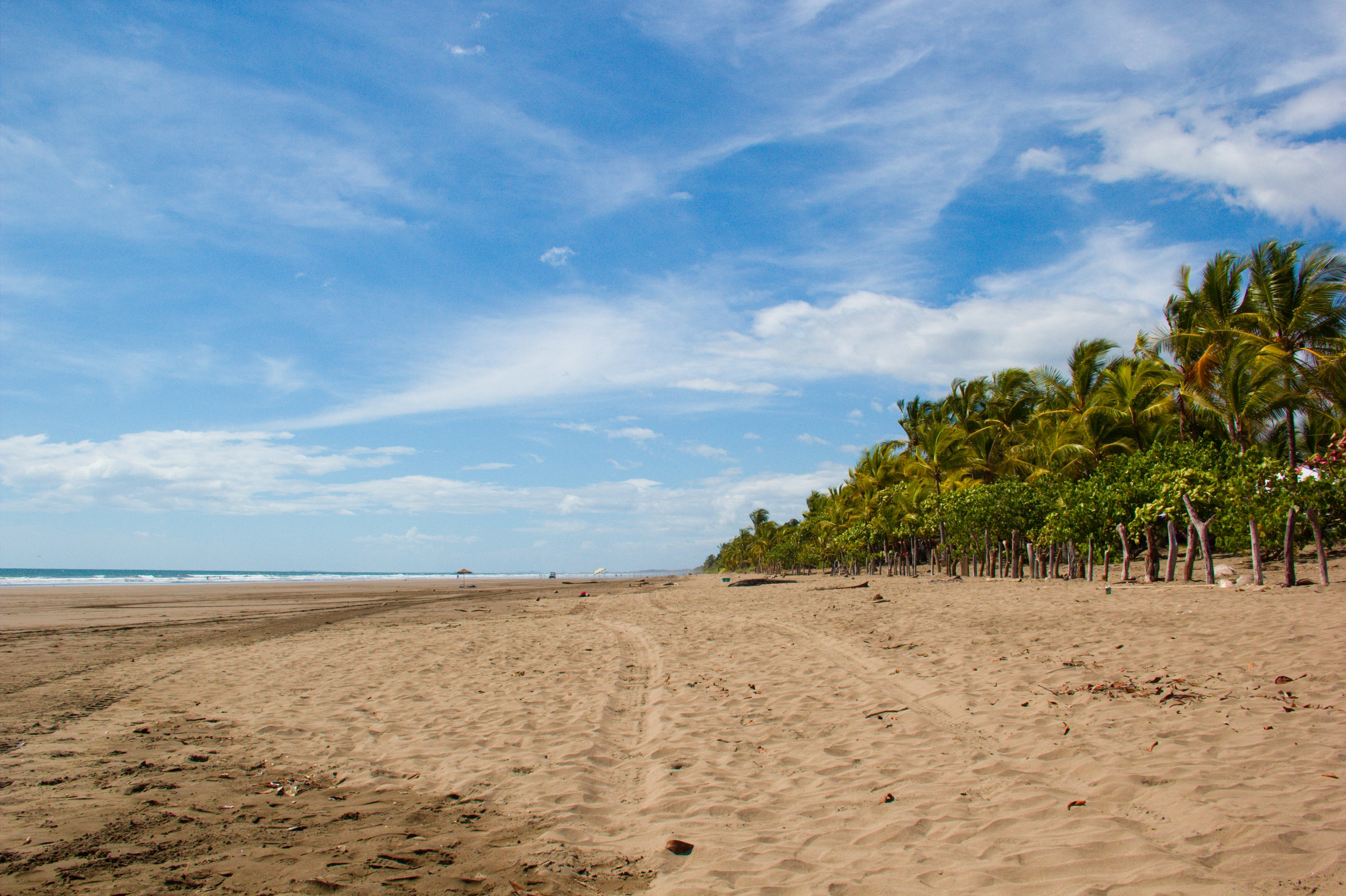 Playa Las Lajas, Provincia de Chiriquí, Panamá.